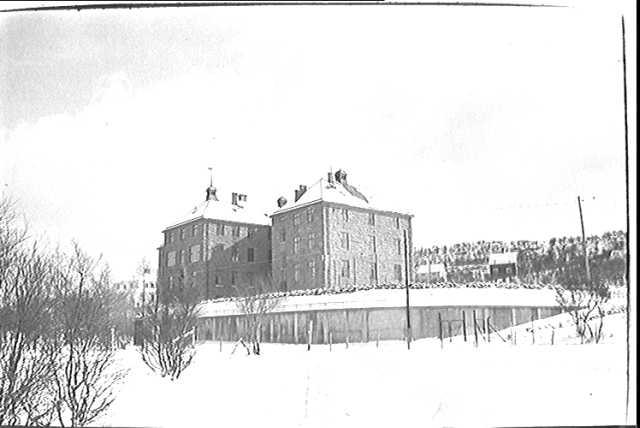 Sandnessjøen Hospital in Sandnessjøen, Norway